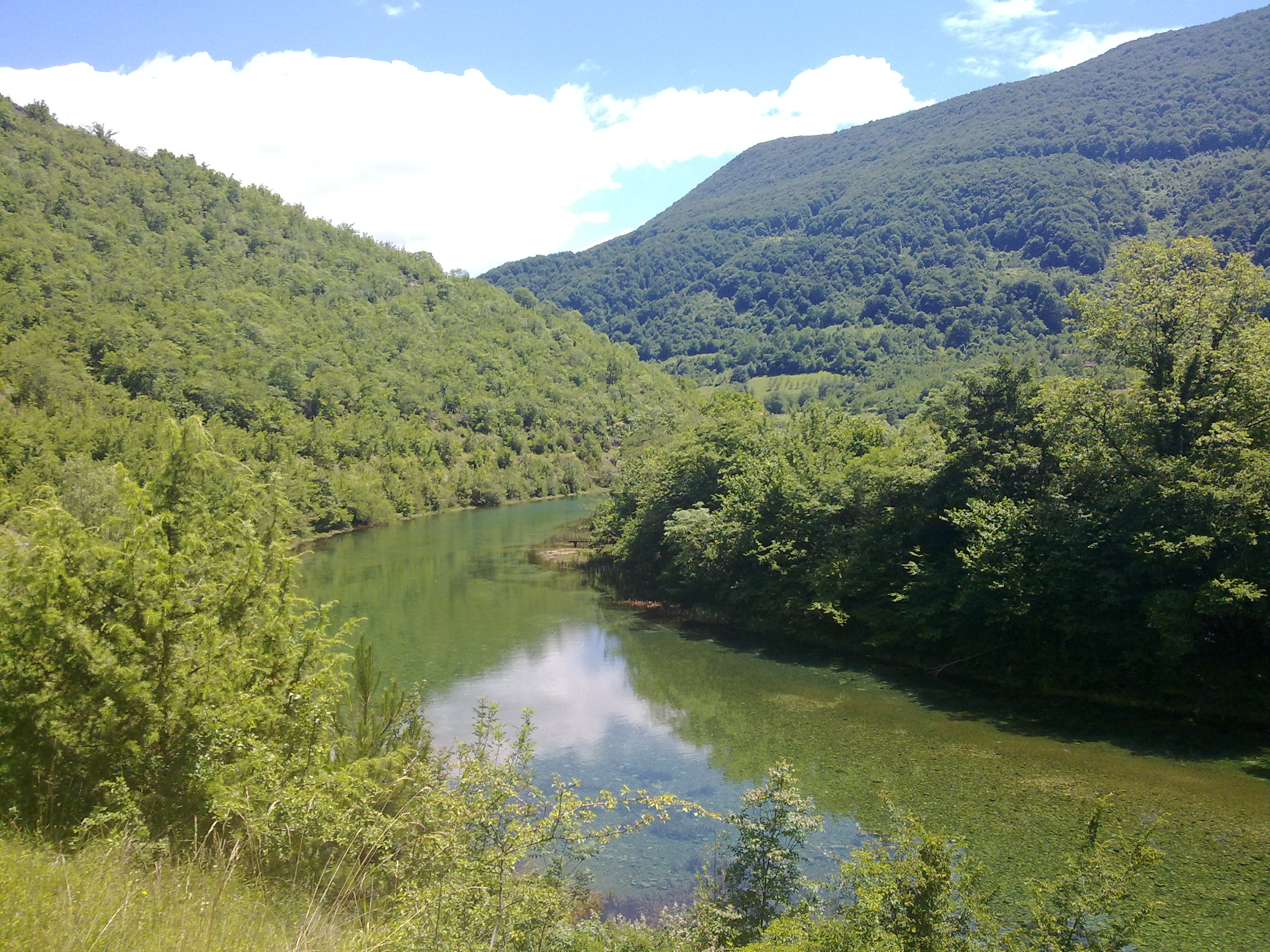 Ribnik